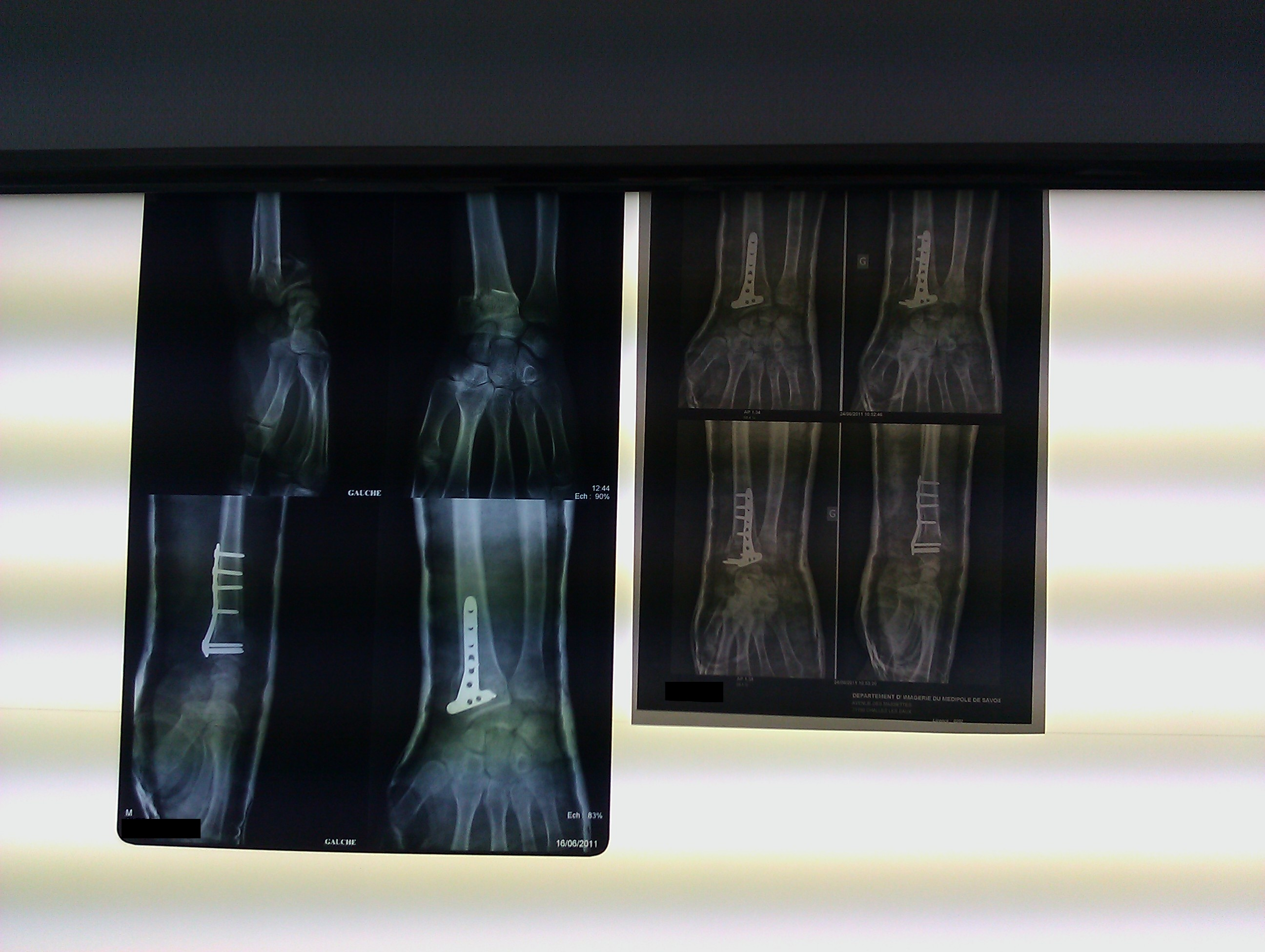 Les radios de mon propre bras gauche. En haut à gauche, 1 heure après la fracture et avant l'opération. En bas à Gauche, 1 jours après l'opération et la poste de la plaque en titane. A droite, 1 semaine après l'opération. PS: la qualité est hélas médiocre, j'essayerais de les scanner plus proprement